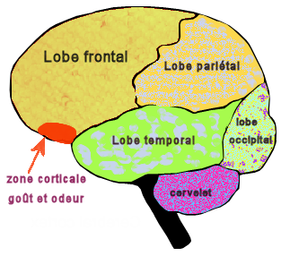 zone corticale préfrontale du gout